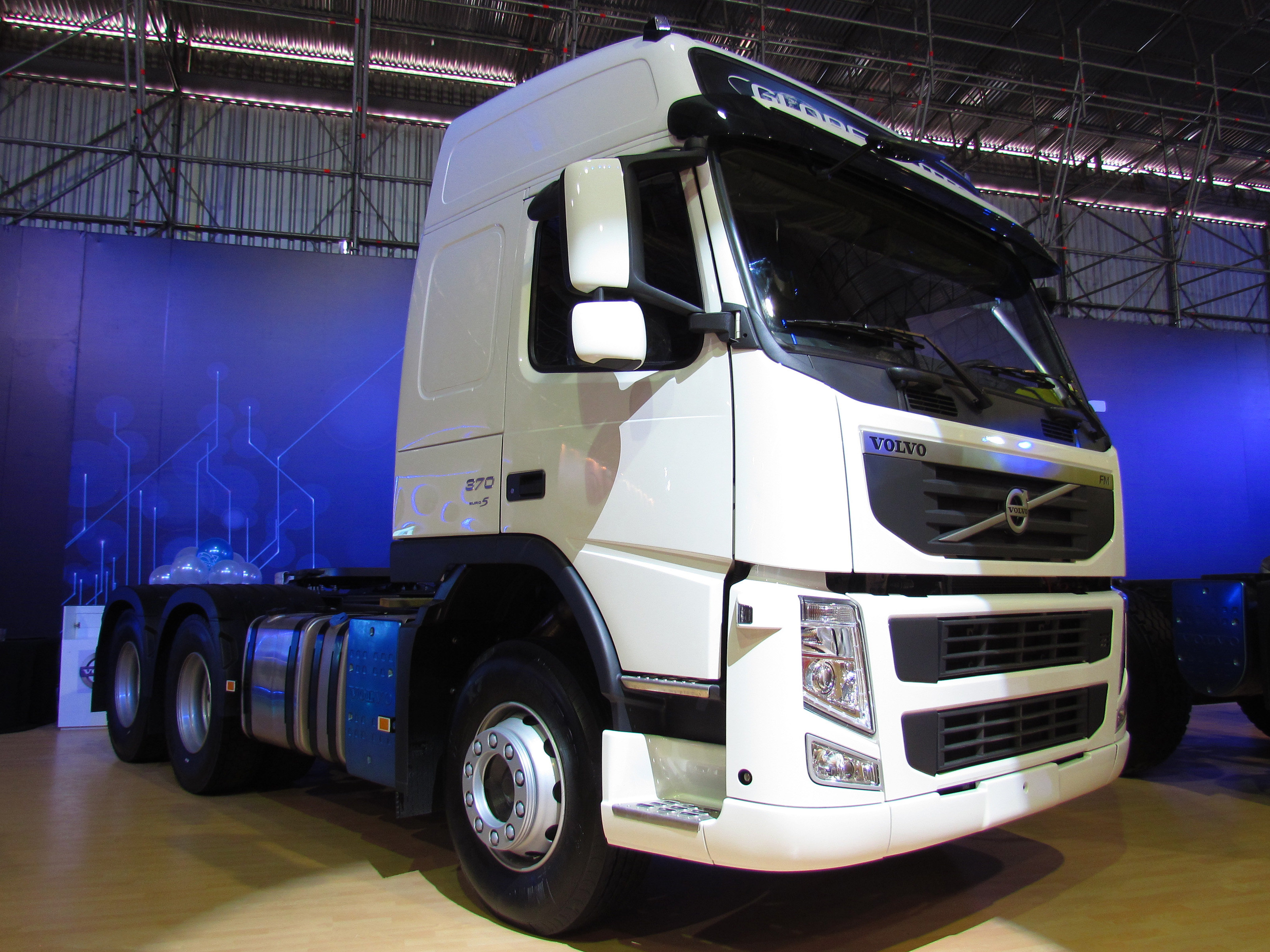 Volvo FM 370 Globetrotter 2014